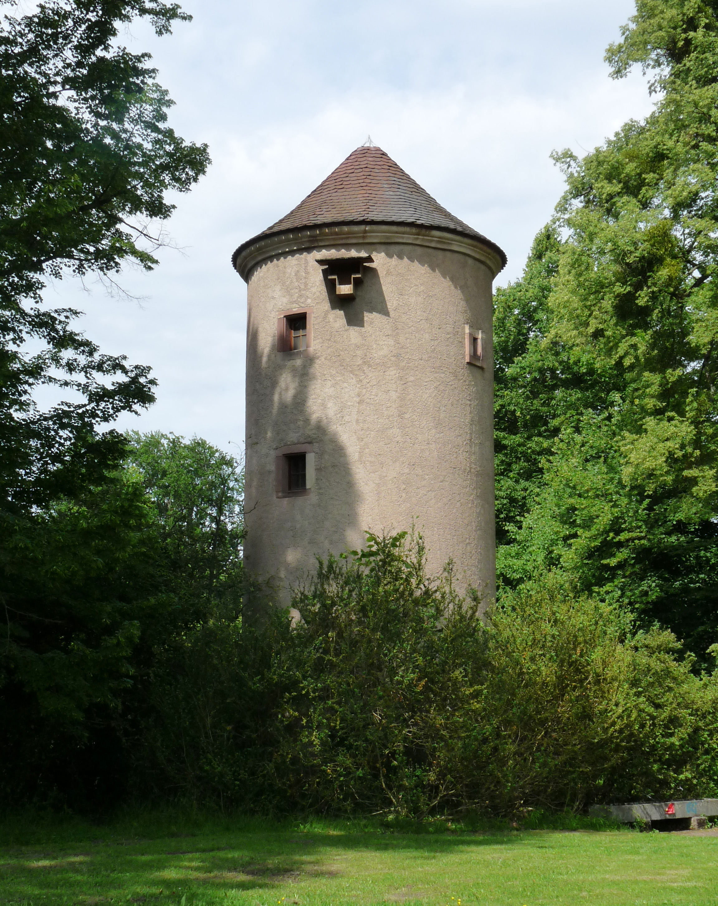 Pigeonnier dans le parc du Château de Pourtalès (Strasbourg)